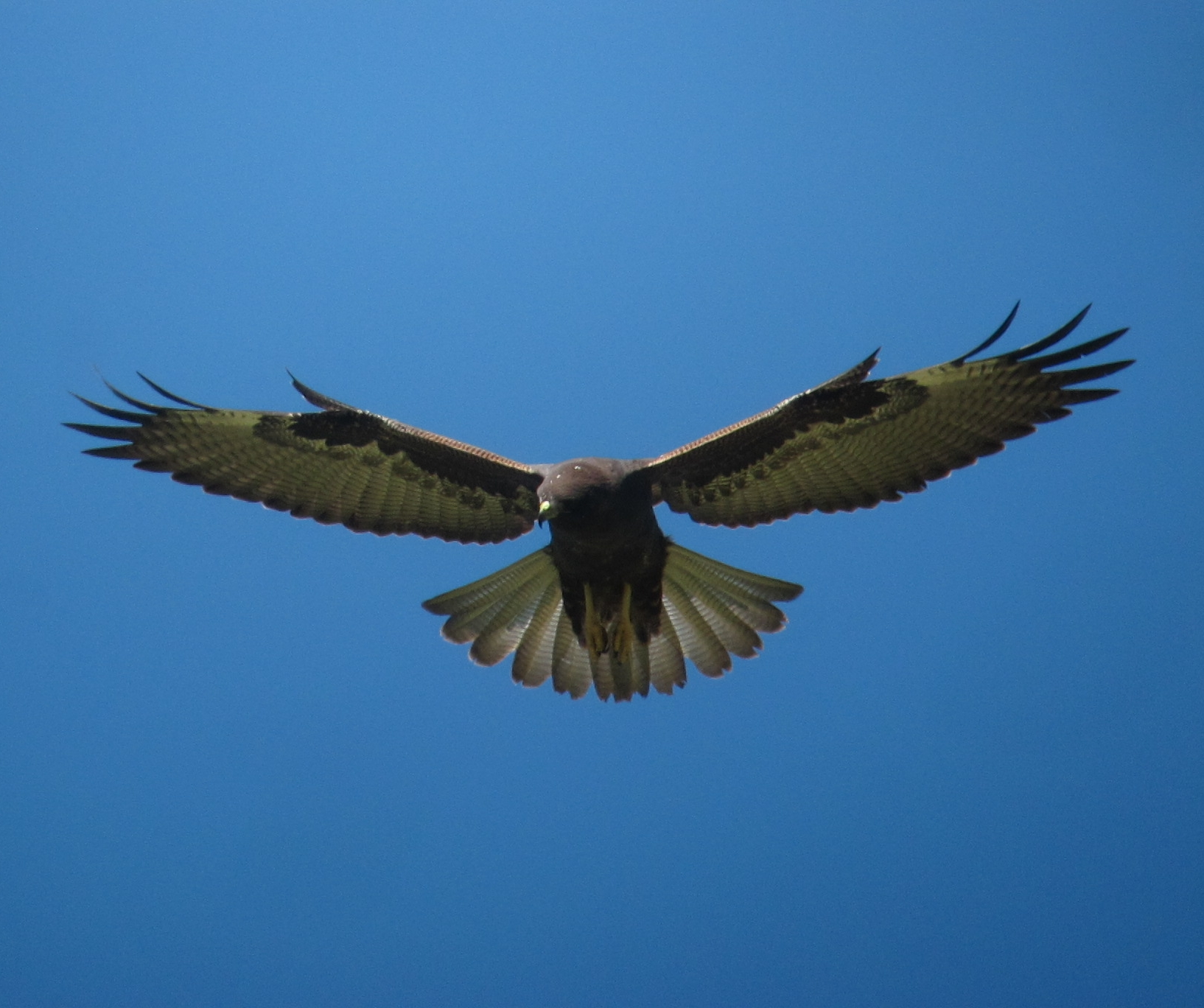 La Uniòn, Antioquia, Colombia